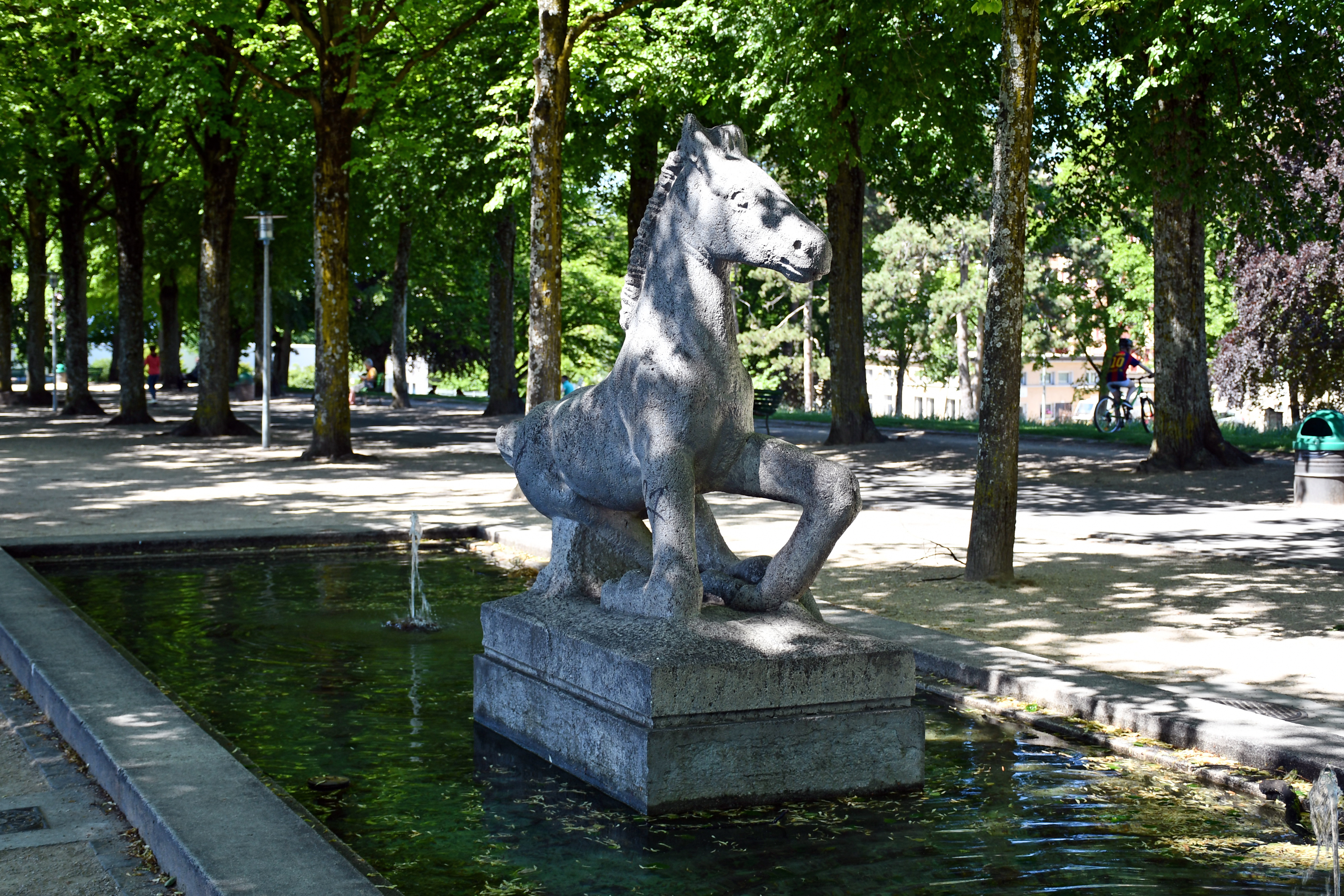 Le Poulain, statue de 1942 de Pierre Blanc, installée dans la fontaine du mail du parc de Valency, à Lausanne (Suisse).